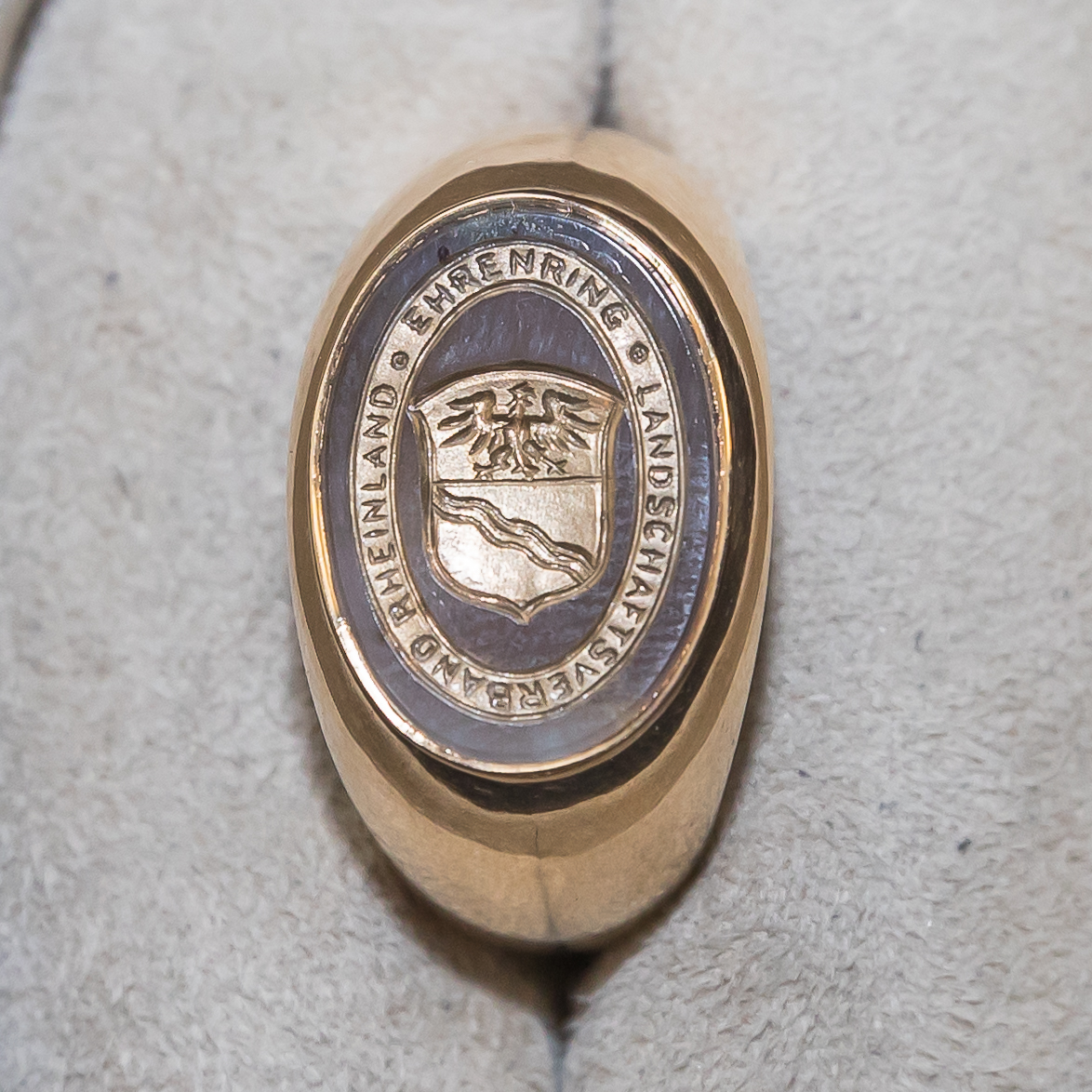 Ehrenring des Rheinlandes, verliehen vom Landschaftsverband Rheinland (LVR)